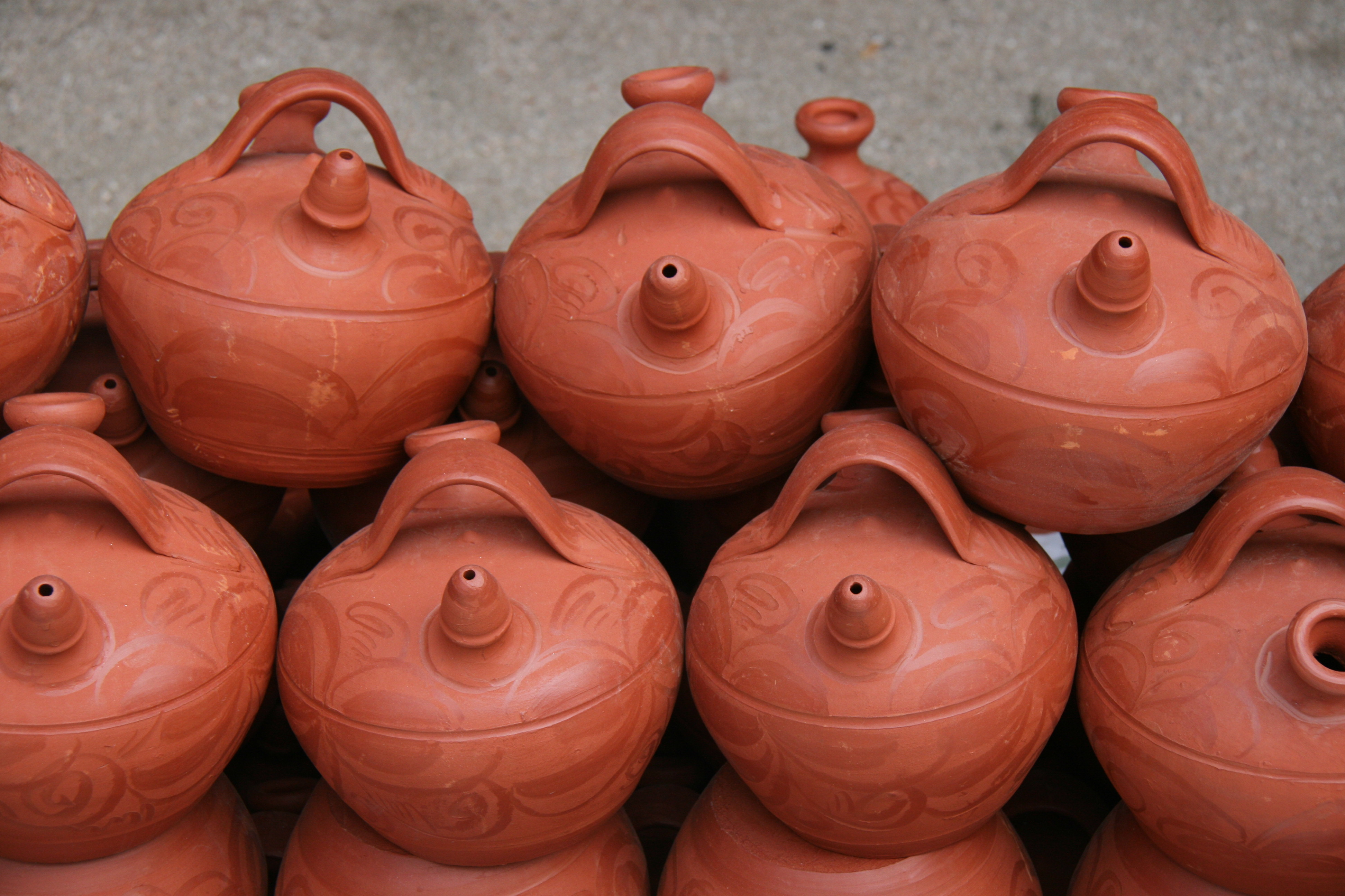 Botijos del Santo (coloraos de Alcorcón)